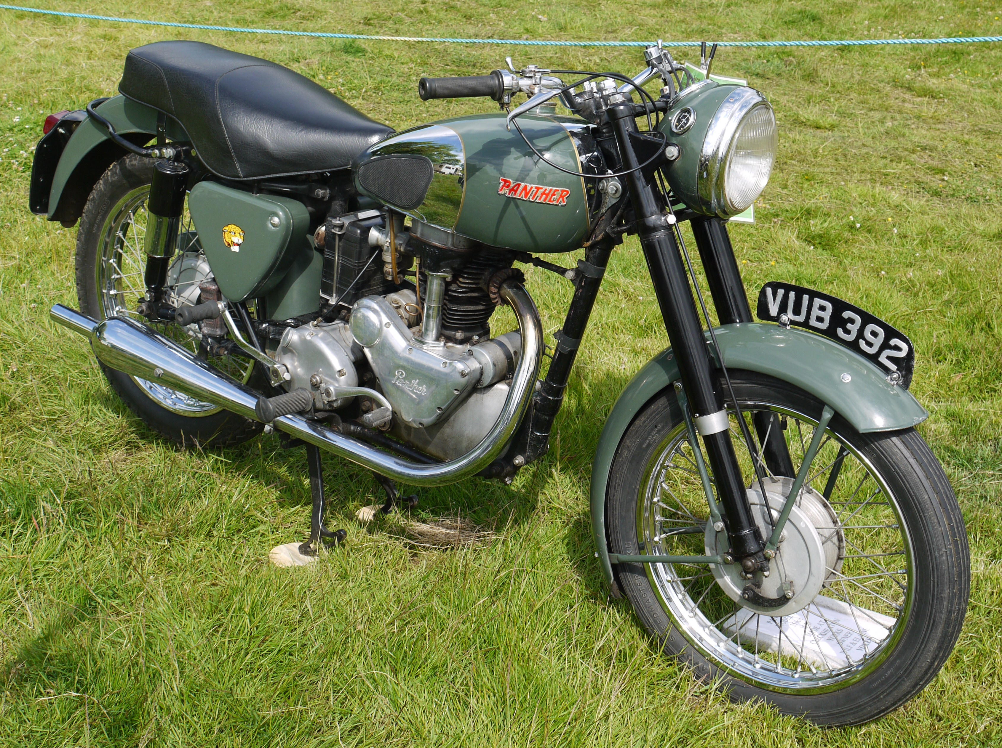 Panasonic G1